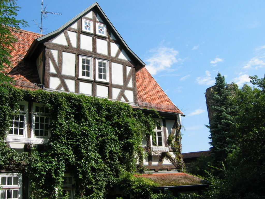 Weidighaus/Rektoratsgebäude in Butzbach